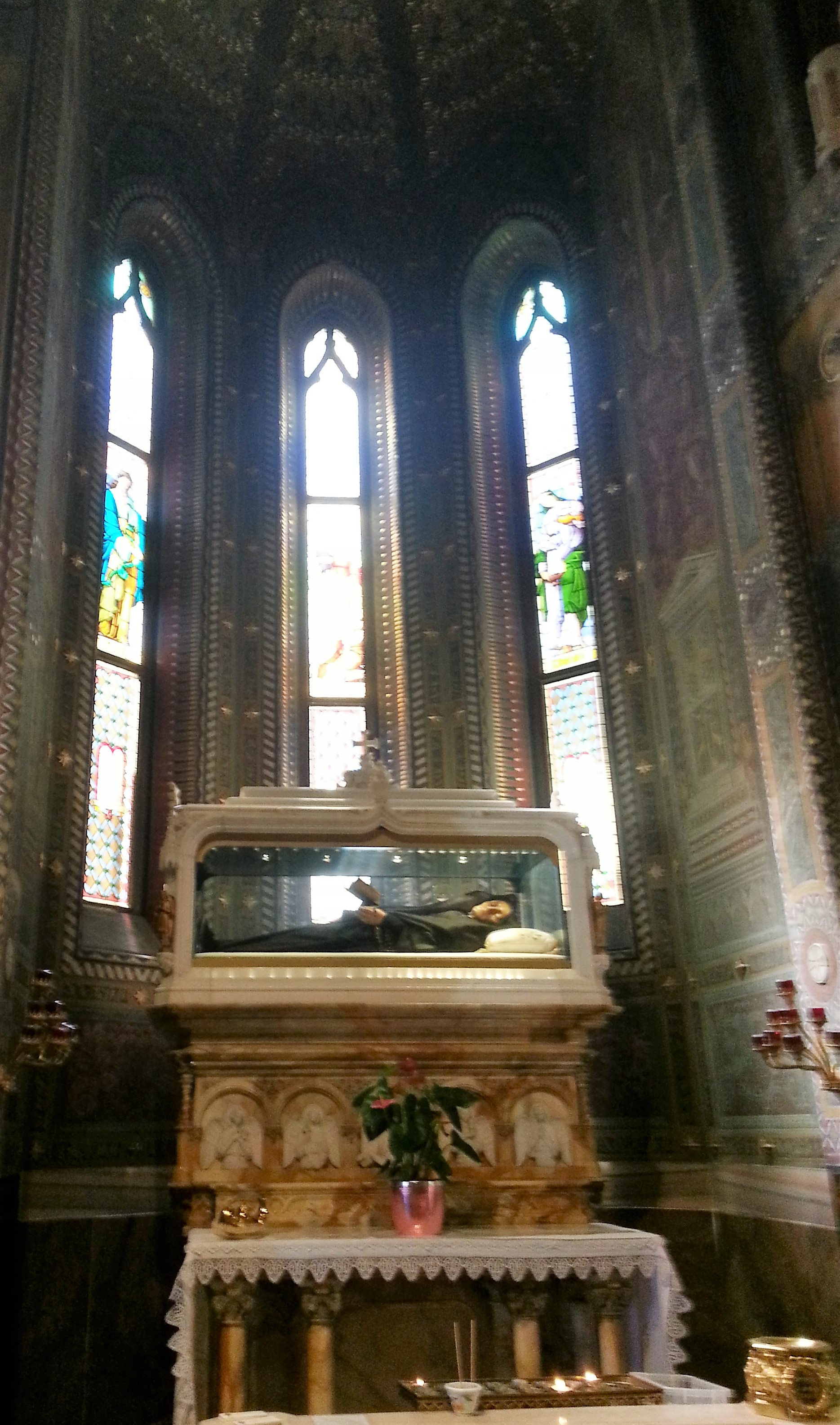 Teca della santa Bartolomea Capitanio nel santuario delle sante Capitanio e Gerosa di Lovere